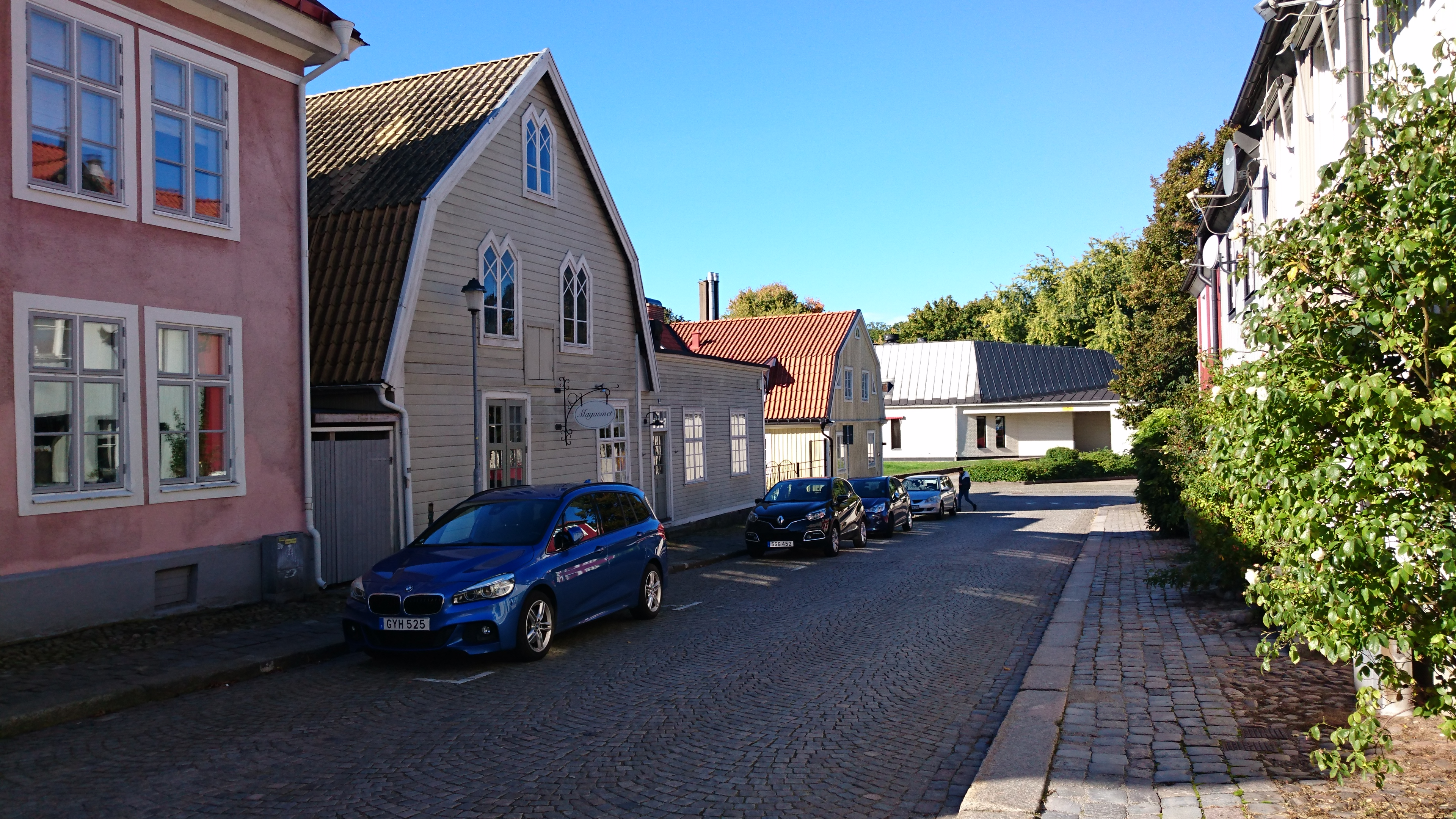 Kvarteret Frans i Ronneby hösten 2017 med Magasinet, Ronneby till vänster i bild.